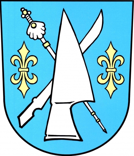 znak, Černín, okres Znojmo